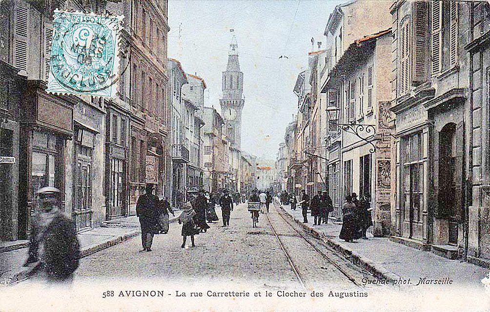 Vue de la rue Carreterie d'Avignon et du clocher des Augustins